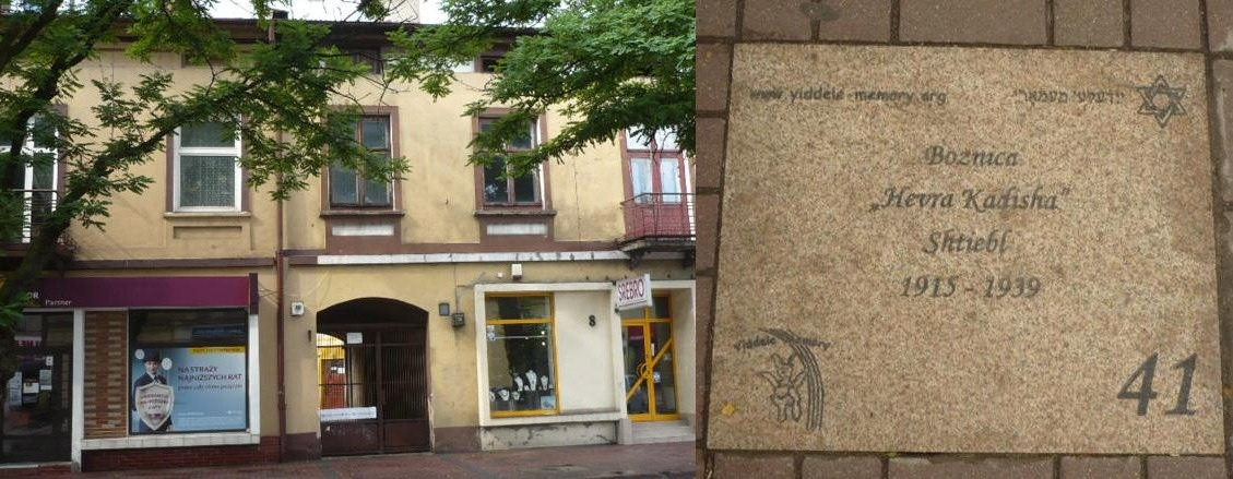 Radomsko. Otwarte Muzeum Żydowskie 41